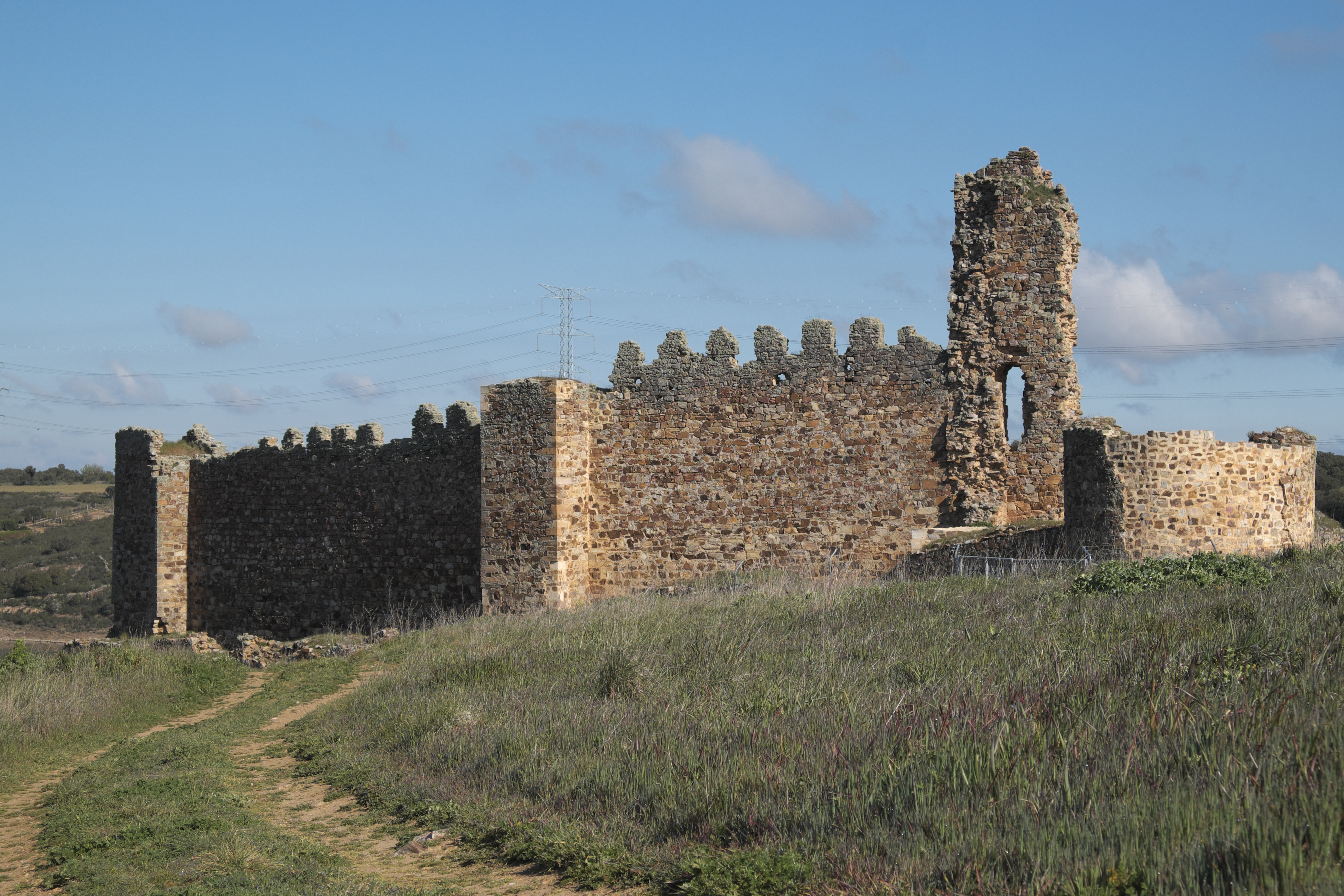 Burg, Castillo de Castrotorafe, in dem aufgegebenen Ort Castrotorafe in San Cebrián de Castro in der Provinz Zamora (Kastilien-León/Spanien)